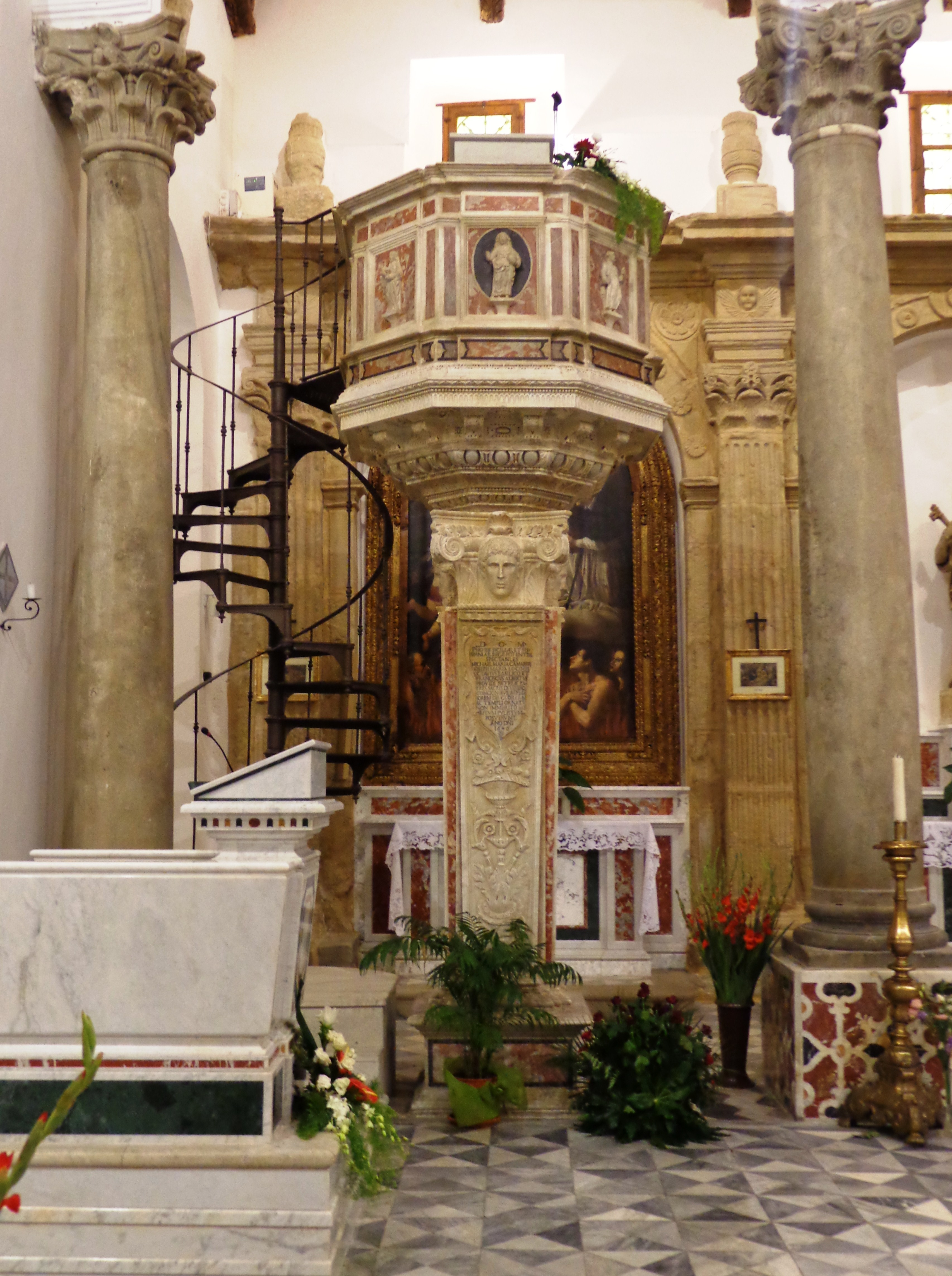 Pulpito Duomo